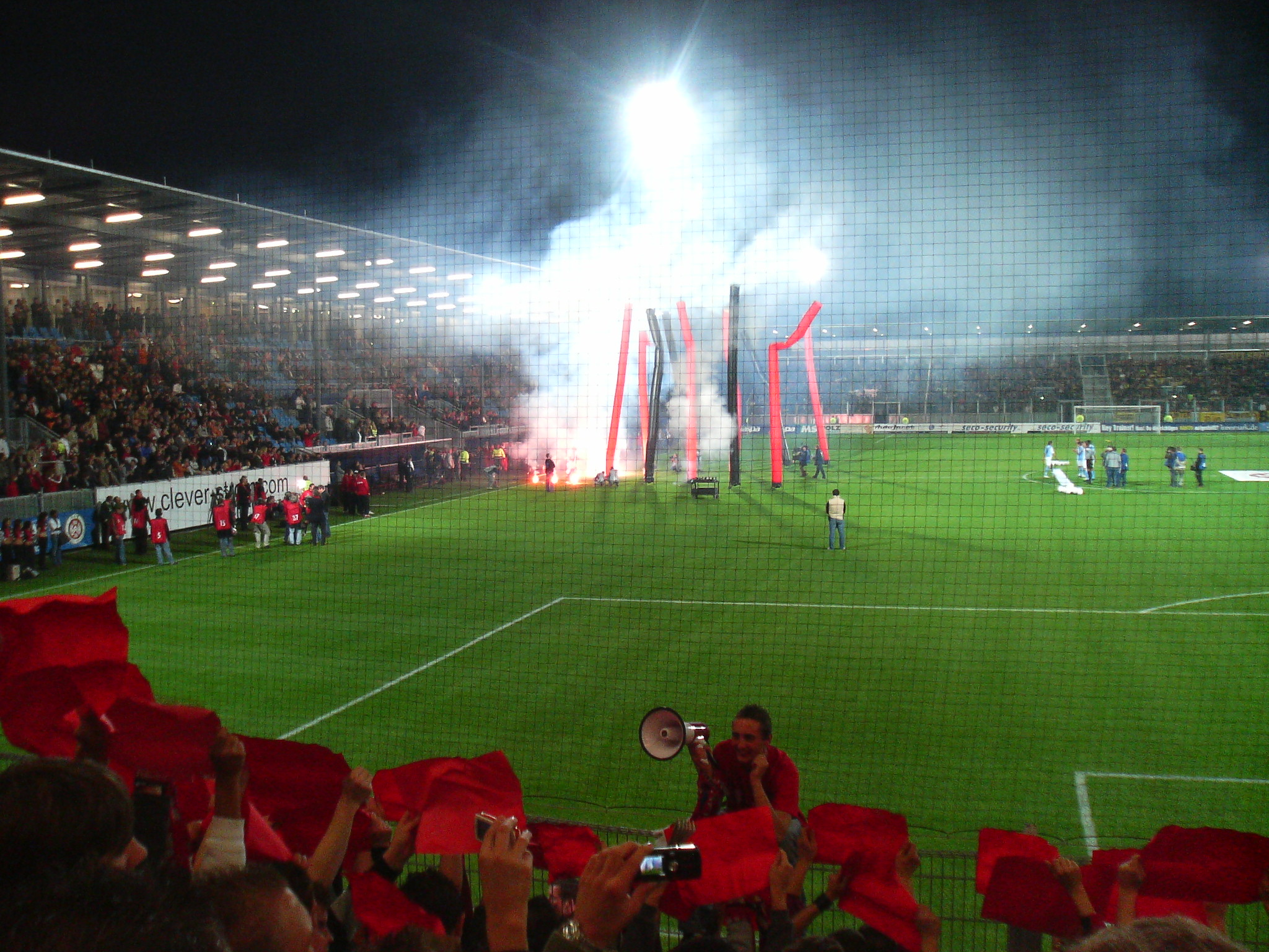 Eröffnungsfeier der Brita Arena